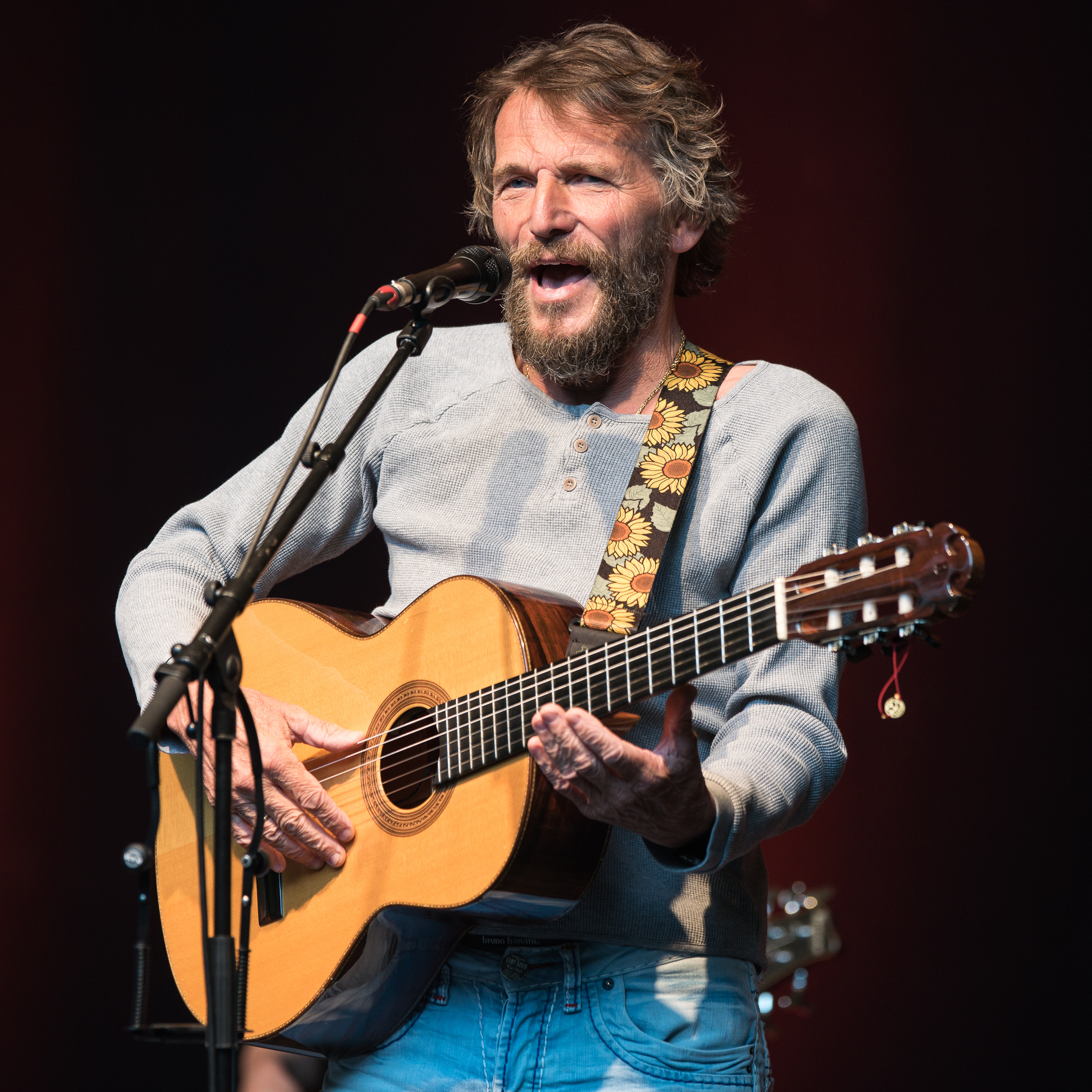 Concertbüro Franken,Hans Söllner & Bayaman Sissdem,Konzert,Livekonzert,Livemusik,Musik,Serenadenhof